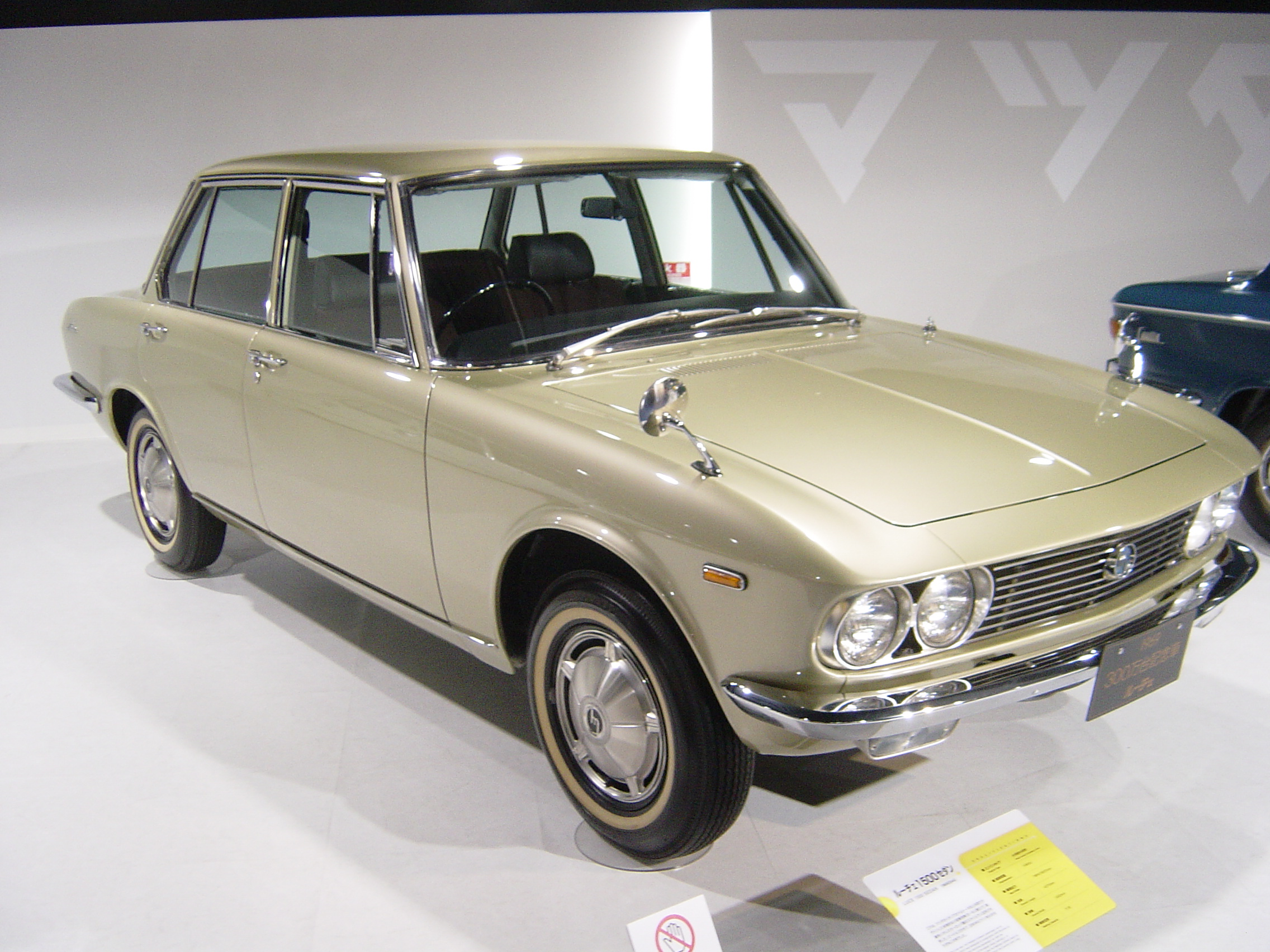 Mazda Luce(マツダ・ルーチェ),Mazda Museum